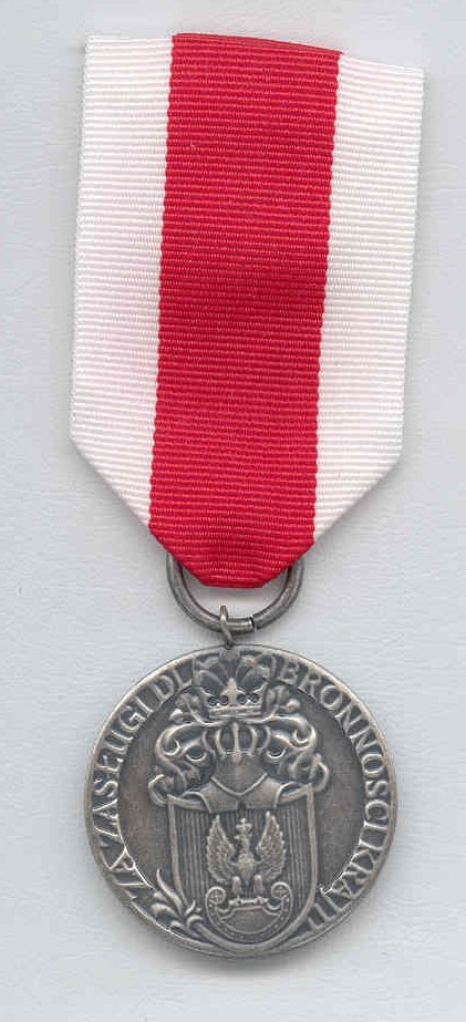 Srebrny Medal „Za zasługi dla obronności kraju“ - awers (wzór od 1991)